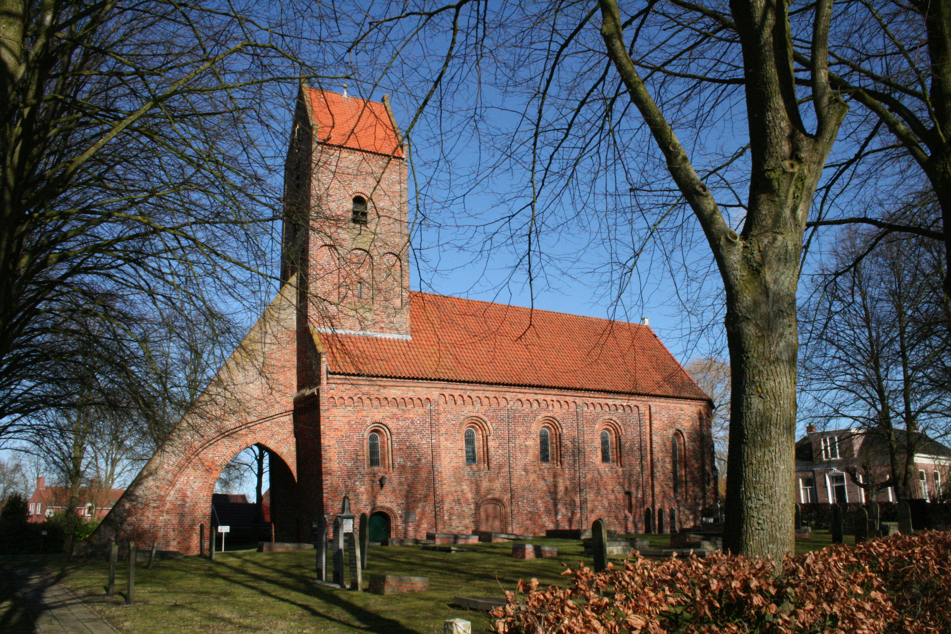 Sebastiaankerk, Bierum, gemeente Delfzijl, provincie Groningen (Nederland). Romanogotische stijl